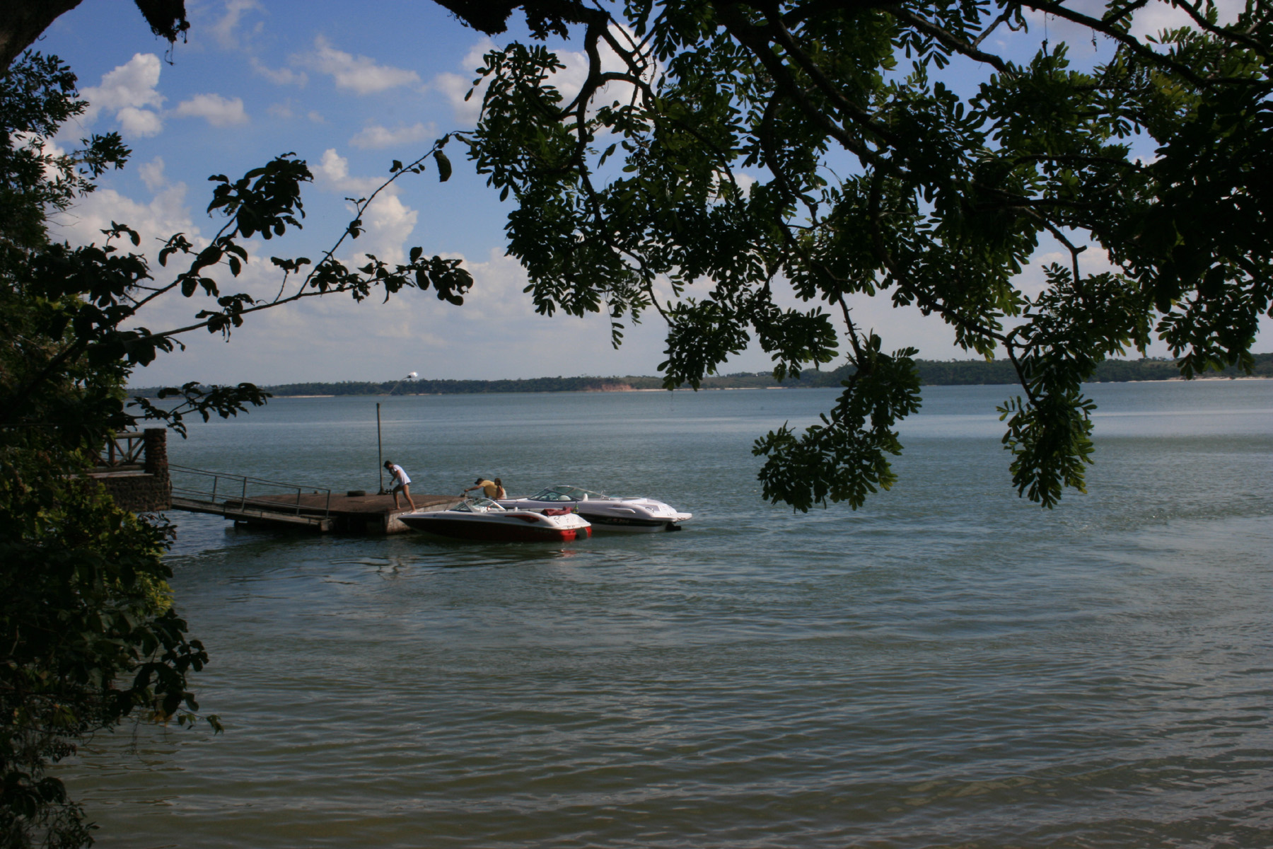 Lagoa Juparanã - Cabana do Minotauro 02